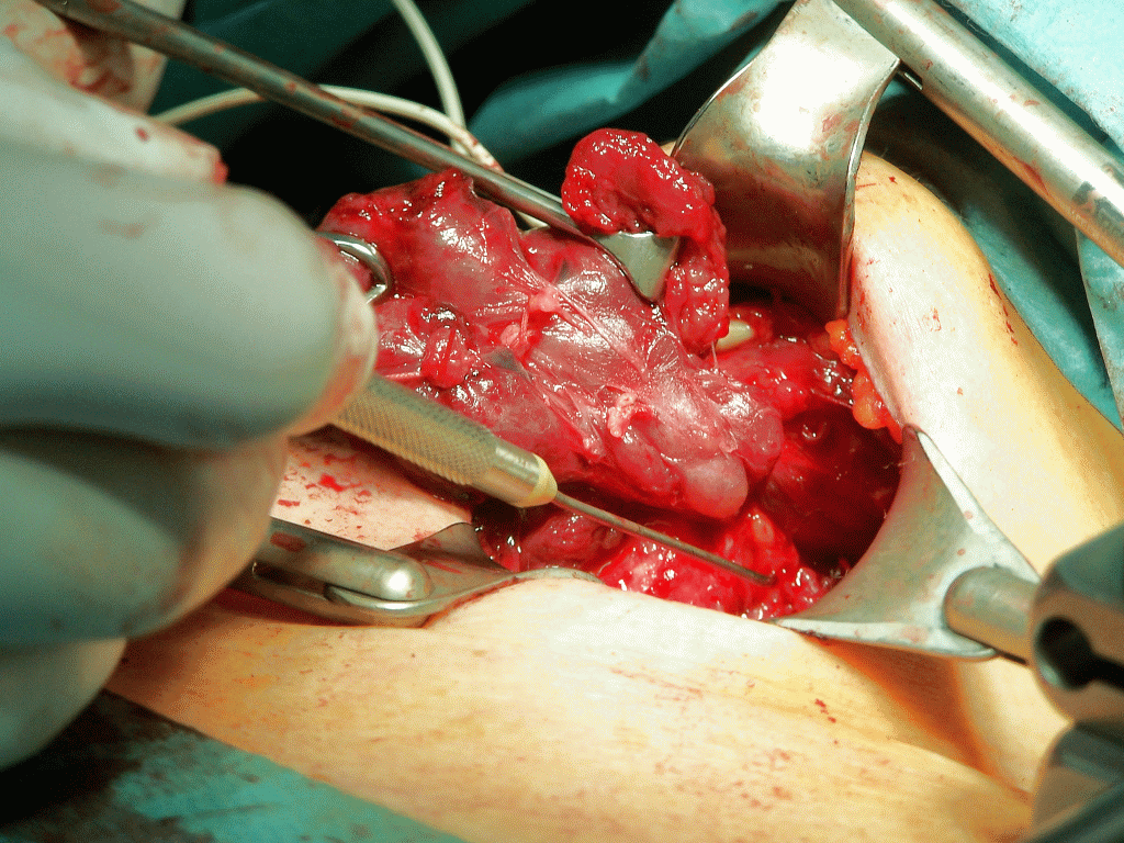 Strumaresektion; Suche nach dem Nervus laryngeus recurrens